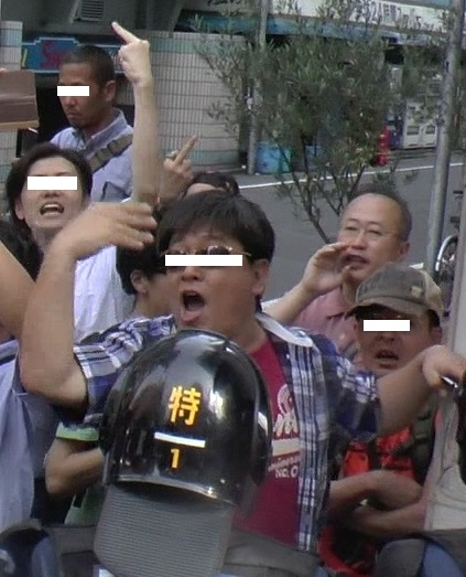 在日外国人犯罪追放デモ in 新大久保 にて撮影目線入り